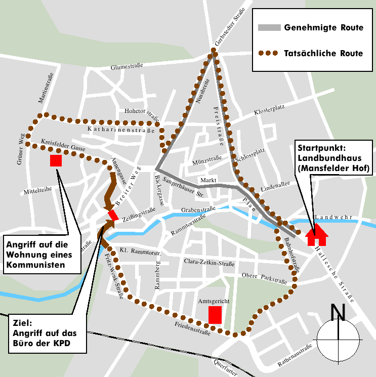 Eisleber Blutsonntag, Der Angriff von SA und SS auf das Büro der KPD am 12.02.1933 in Eisleben